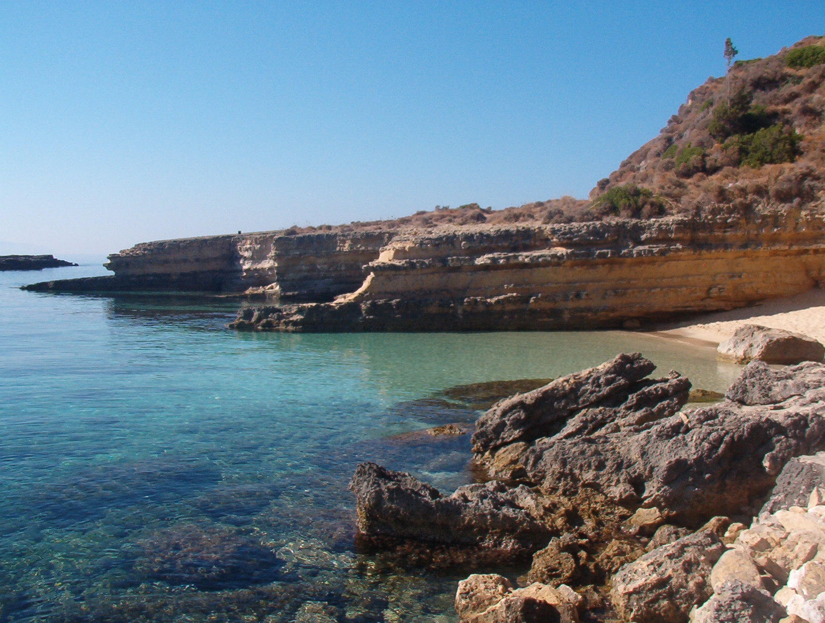 Fantastica spiaggia di cefalonia che ho fotografato.